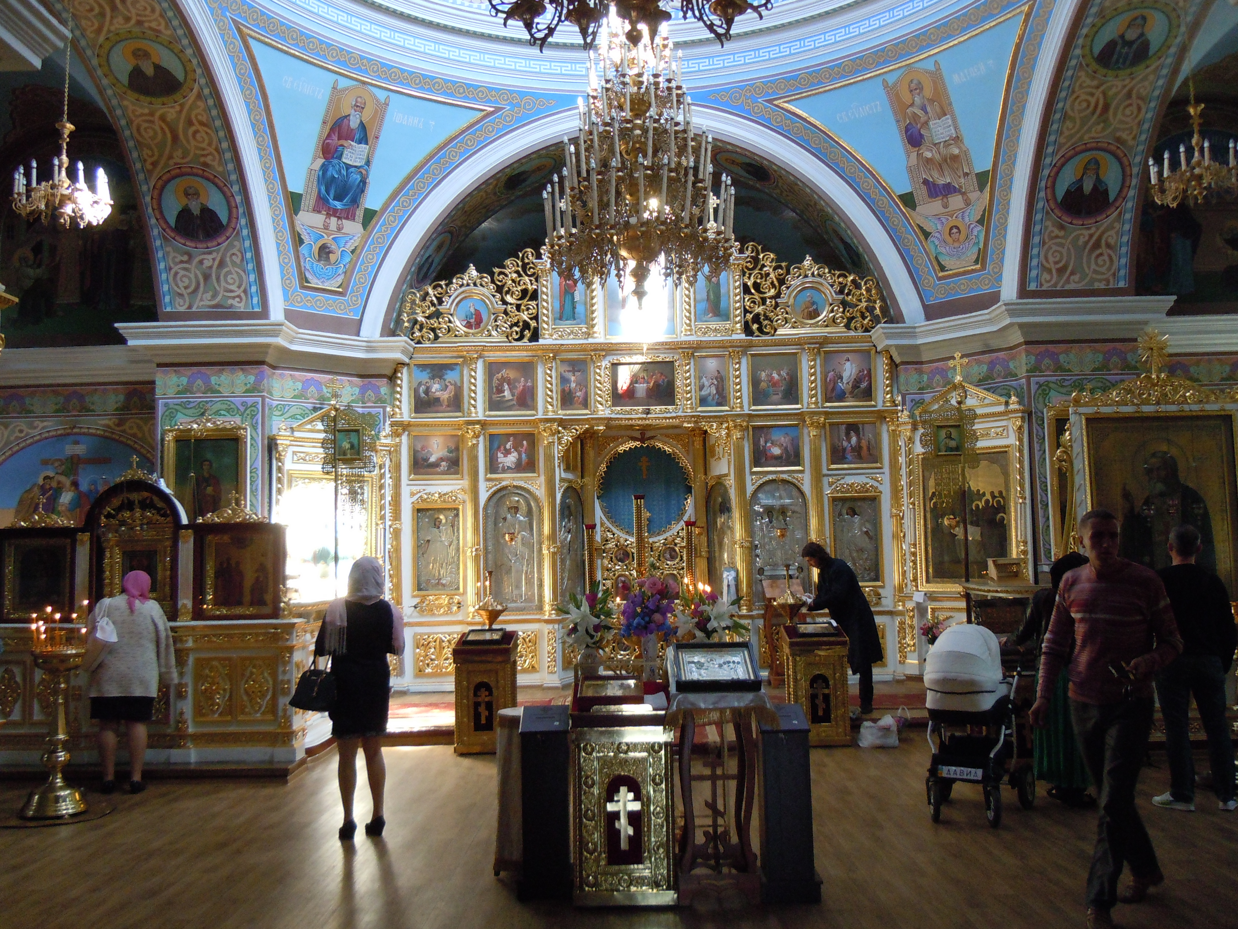 Комплекс споруд Святоуспенського монастиря. Церква Успіння Пресвятої Богородиці, Одеса, Маячний пров., 6